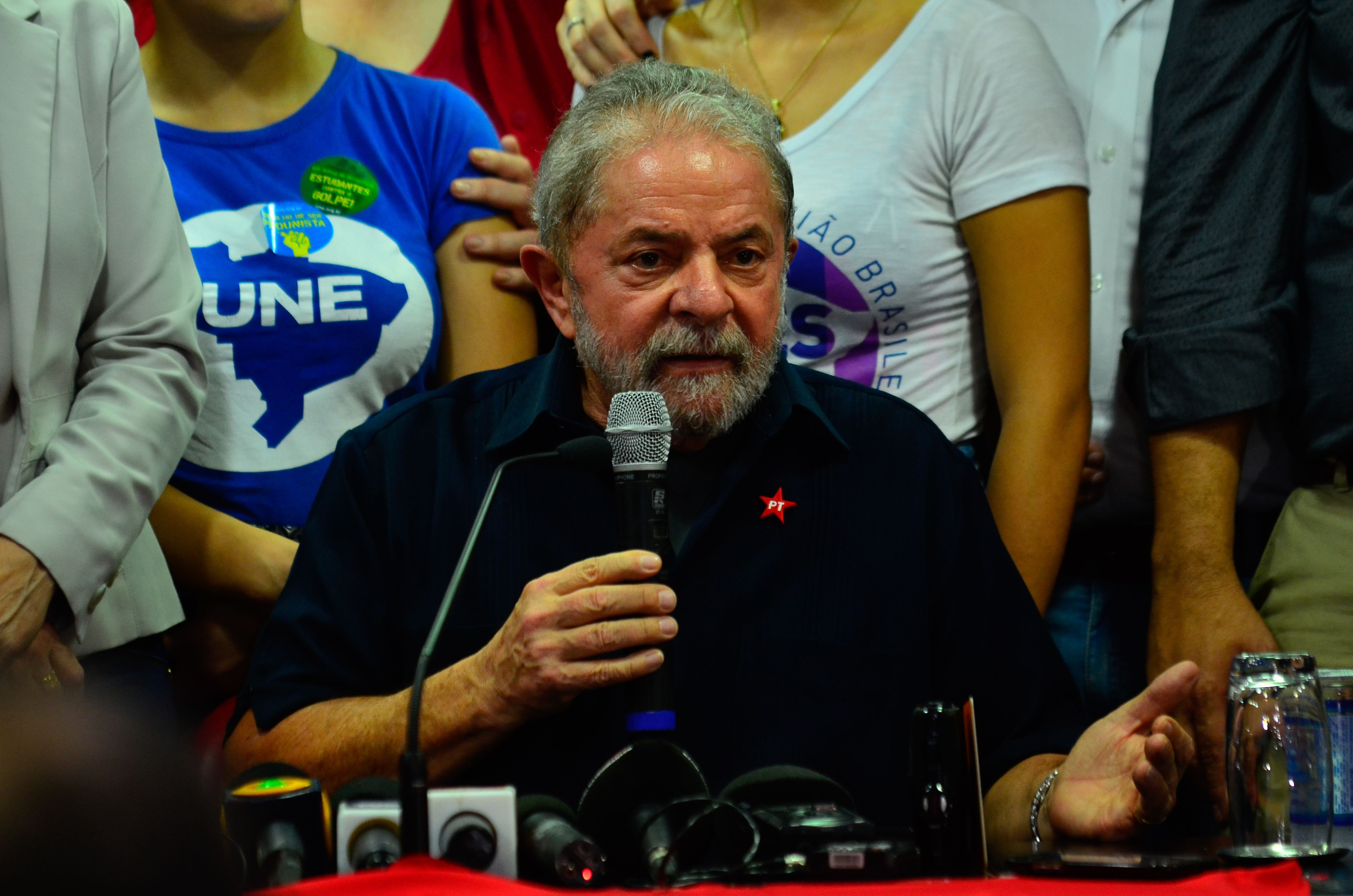 Ex-presidente Lula em entrevista no Diretório Nacional do PT em São Paulo, no dia 4 de março de 2013, após condução coercitiva e depoimento prestado à Polícia Federal no âmbito da 24ª fase da Operação Lava Jato